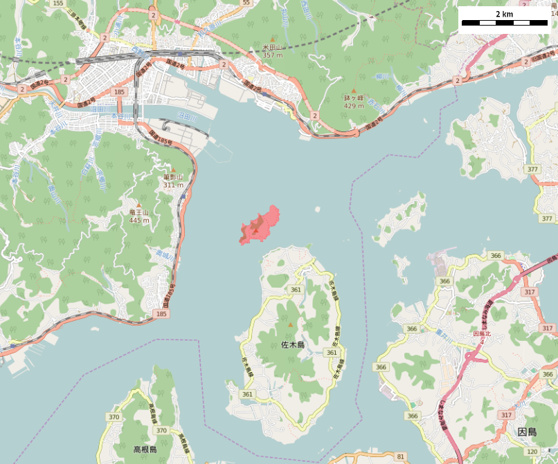 広島県三原市の小佐木島周辺 This map may be incomplete, and may contain errors. Don't rely solely on it for navigation.